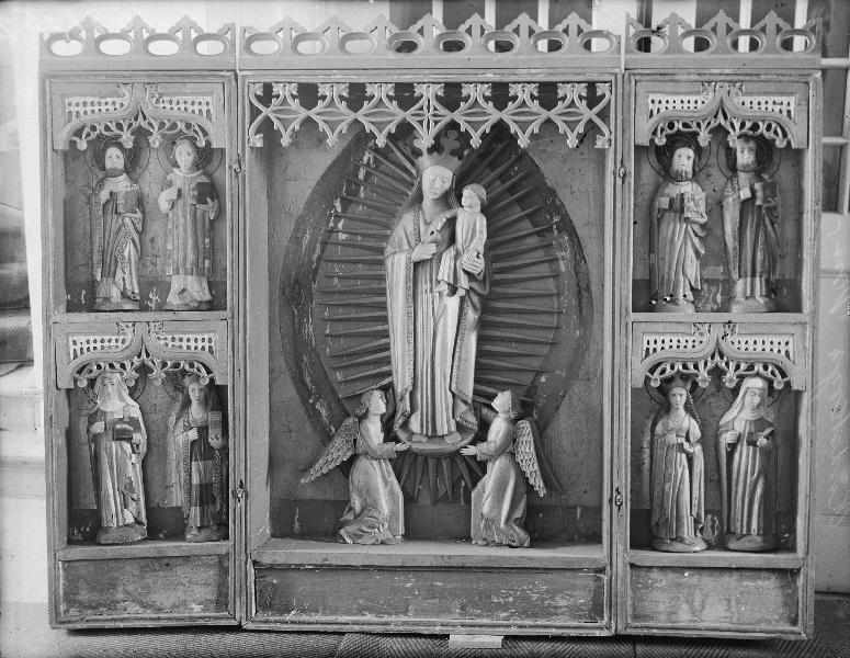 Altarskåp, 1500-talet. I korpus skulptur föreställande Madonnan med barnet stående på månskära och buren av två änglar. Snabbinv. Kategori: (05) AltarprydnaderAltarskåp, 1500-talet. I korpus skulptur föreställande Madonnan med barnet stående på månskära och buren av två änglar. Snabbinv.